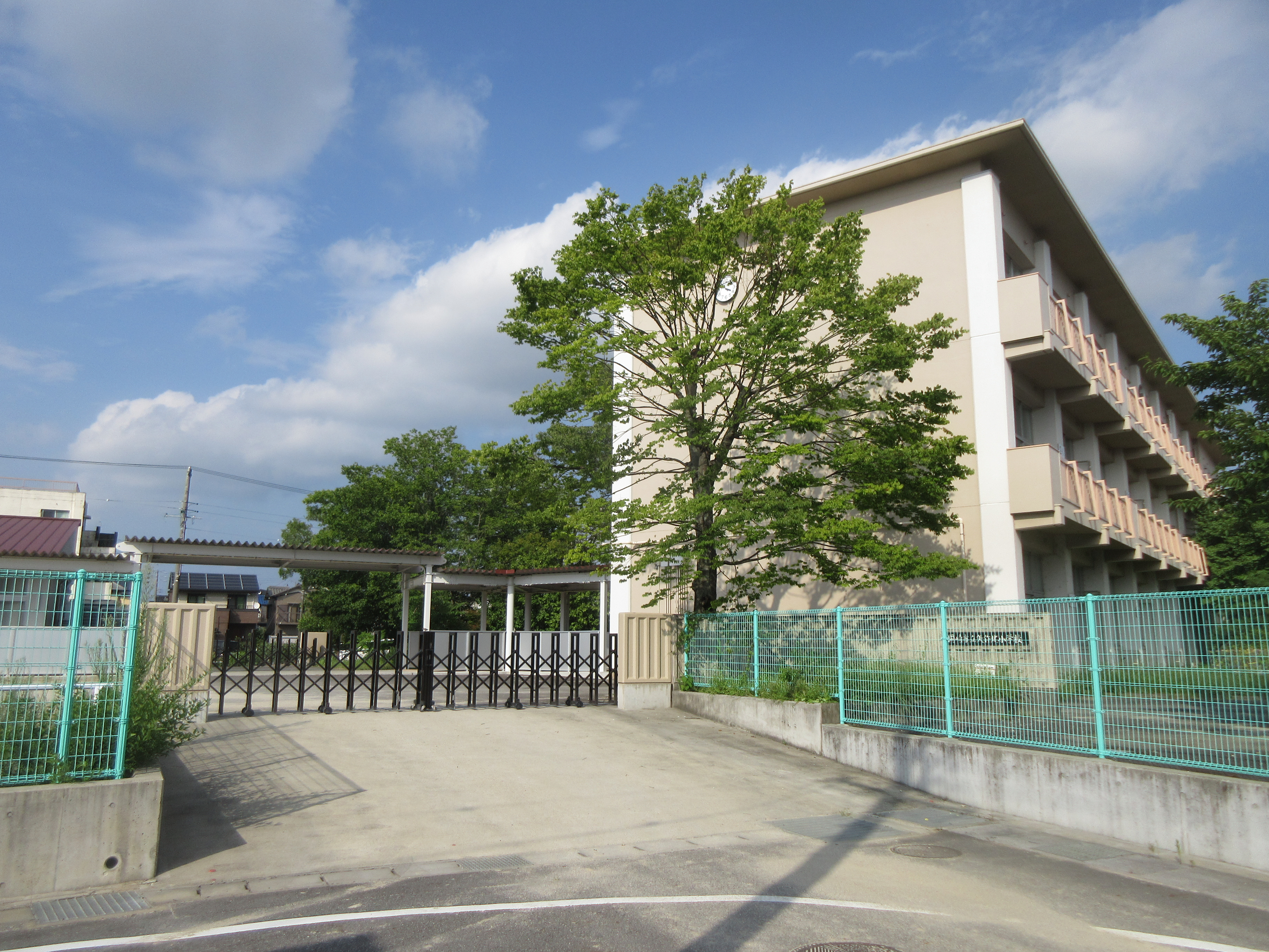 岡崎市立矢作北小学校（岡崎市橋目町）